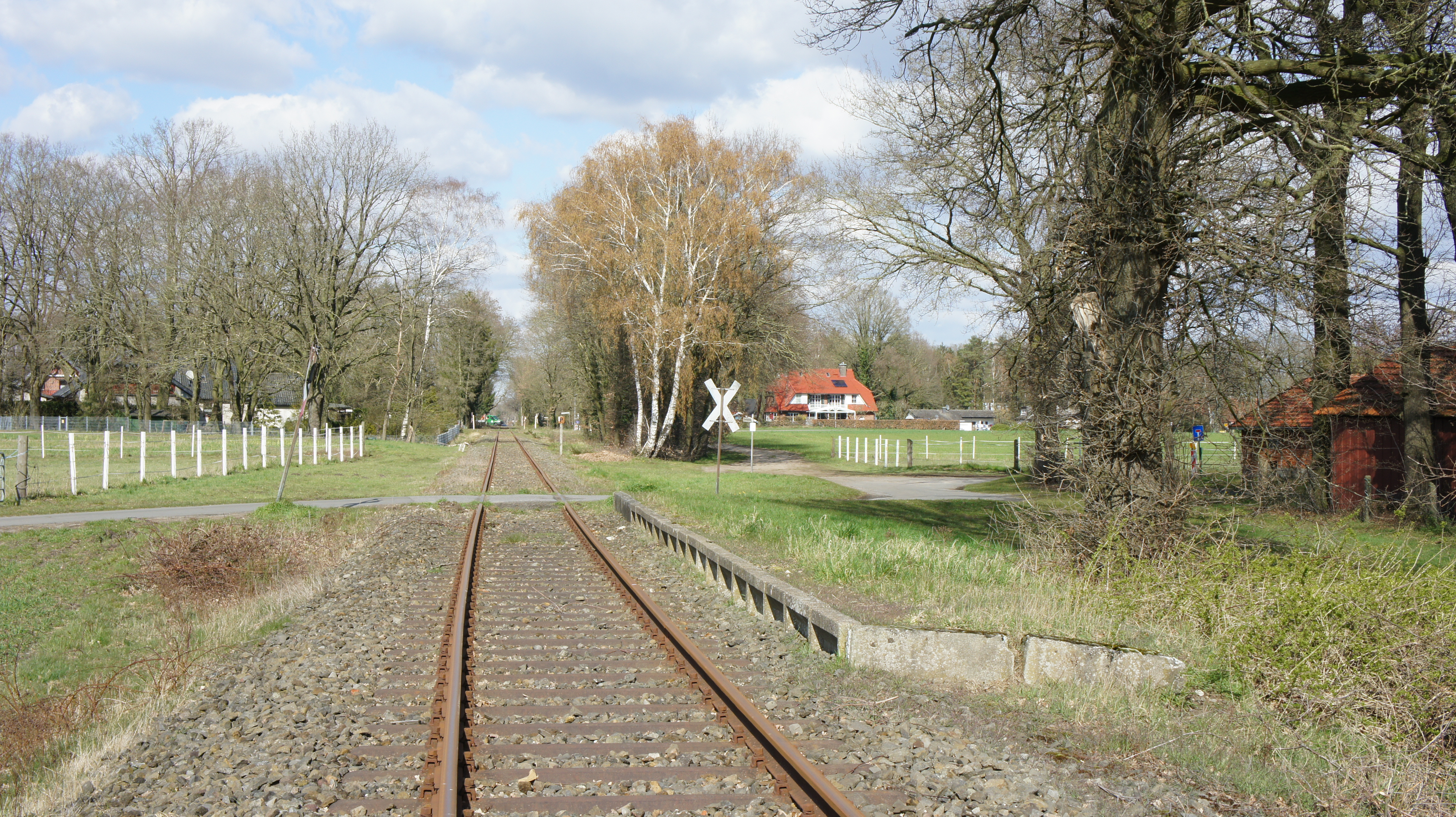 Alter Bahnsteig in Bürstel am Gerdshüttenweg